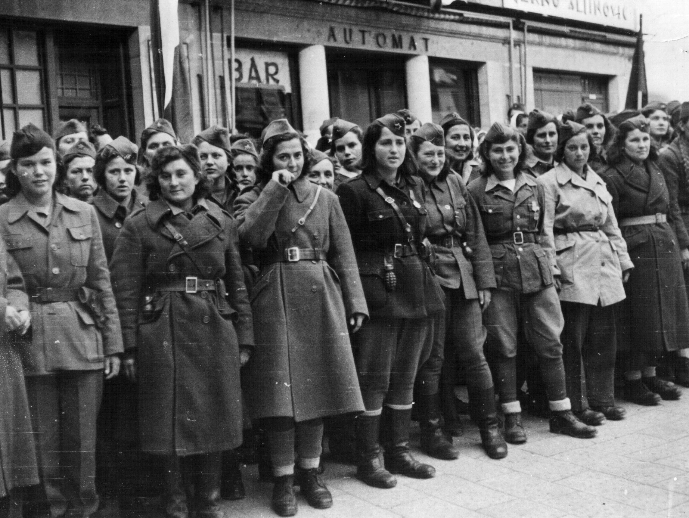 Srpskohrvatski / српскохрватски: Borkinje iz Dalmacije u oslobođenom Splitu 1944.